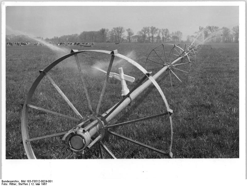 Hadmersleben, Beregnungsanlage Zentralbild Ritter 12.5.1967 Magdeburg: Größte Beregnungsanlage der DDR übergeben Hier die Anlage in Aktion. Ein weitverzweigtes Rohrsystem von 56 Kilometern Länge mit 500 Hydranten wird seit dem 11.5.1967 im Lehr- und Versuchsgut Hadmersleben mit Wasser aus der Bode gespeist. Es beregnet über 230 Mittelstarkregner auf einer Fläche von insgesamt 2000 Hektar. Neun Pumpen pressen pro Stunde 1500 Kubikmeter Wasser in die Rohrleitungen. Mit Hilfe des künstlichen Regens können die Werktätigen des Lehr- und Versuchsgutes sowie vier LPG ihre Felderträge in den nächsten Jahren erheblich steigern. So erhöhen sich z.B. die Getreideerträge bis 1970 von gegenwärtig 43 auf 56 Dezitonnen, die Rübenerträge von 380 auf 480 und die Kartoffelerträge von 233 auf 270 Dezitonnen je Hektar.